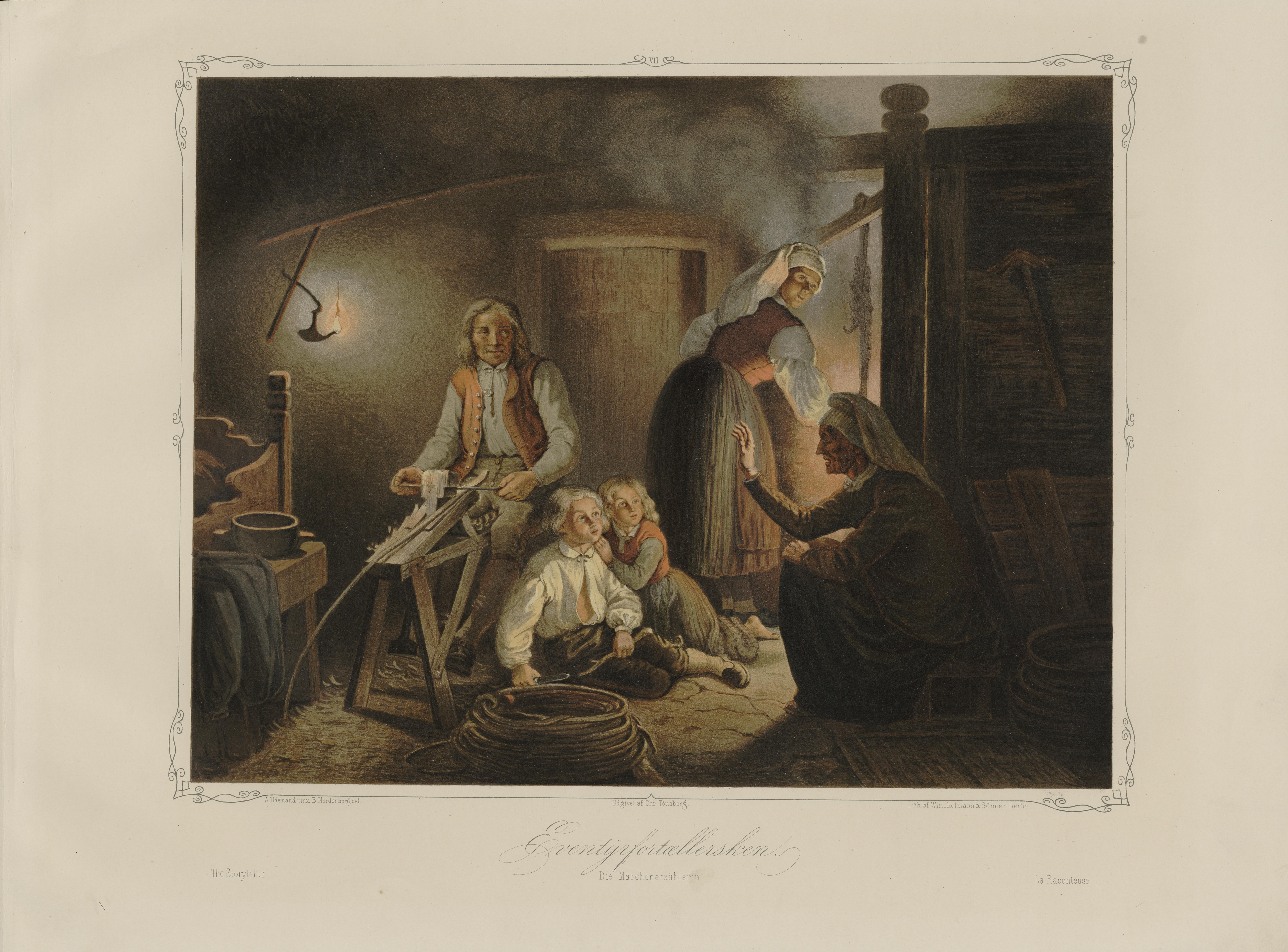 Illustrasjon hentet fra boken Norske Folkelivsbilleder av Tidemand, Adolph og utgitt av Chr. Tønsberg (Christiania, 1854)